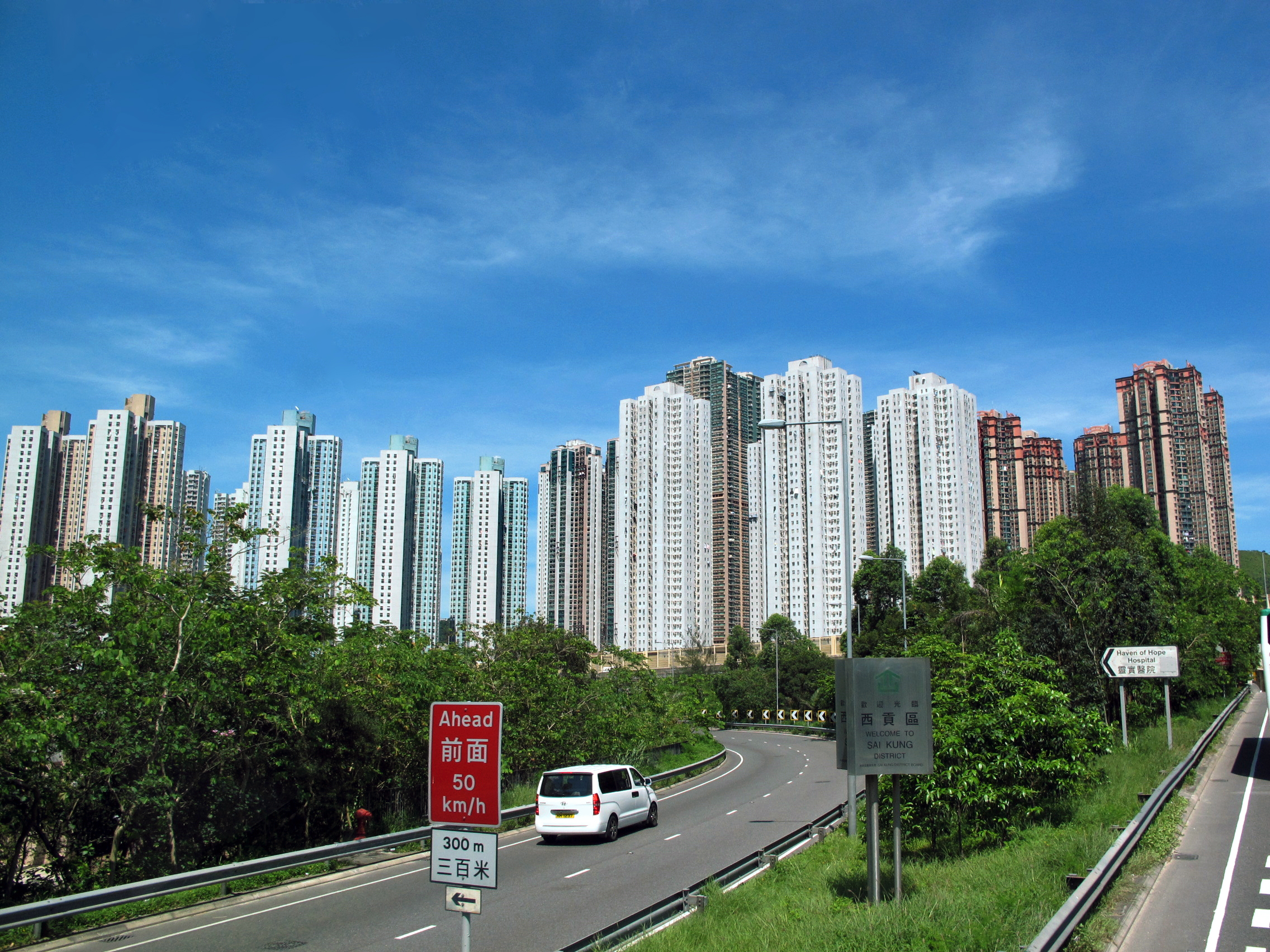 Hang Hau 坑口